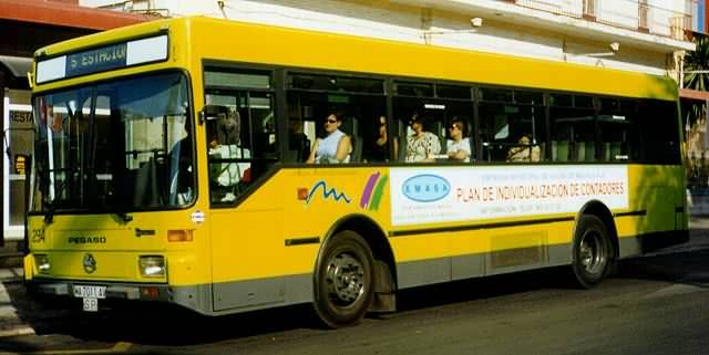 Autobús de la extinta línea 5 de la EMT de Málaga.